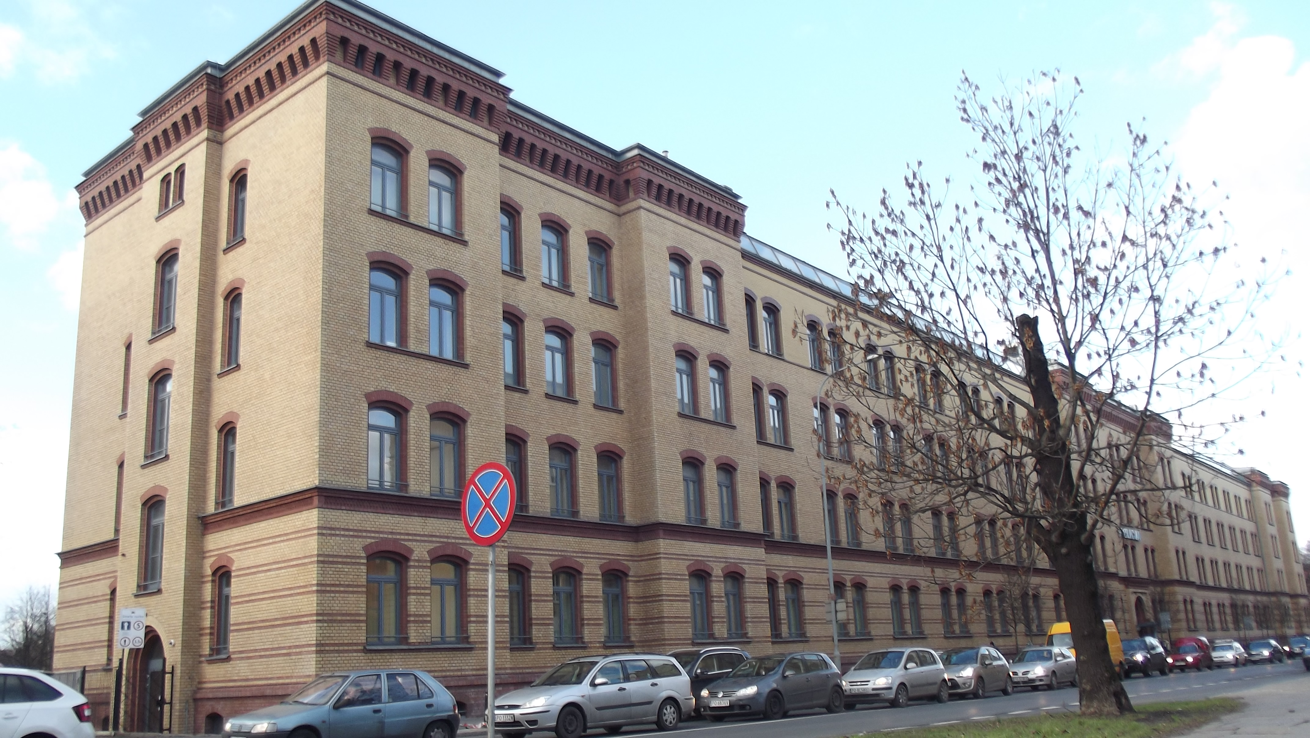 Komenda Miejska Policji w Poznaniu